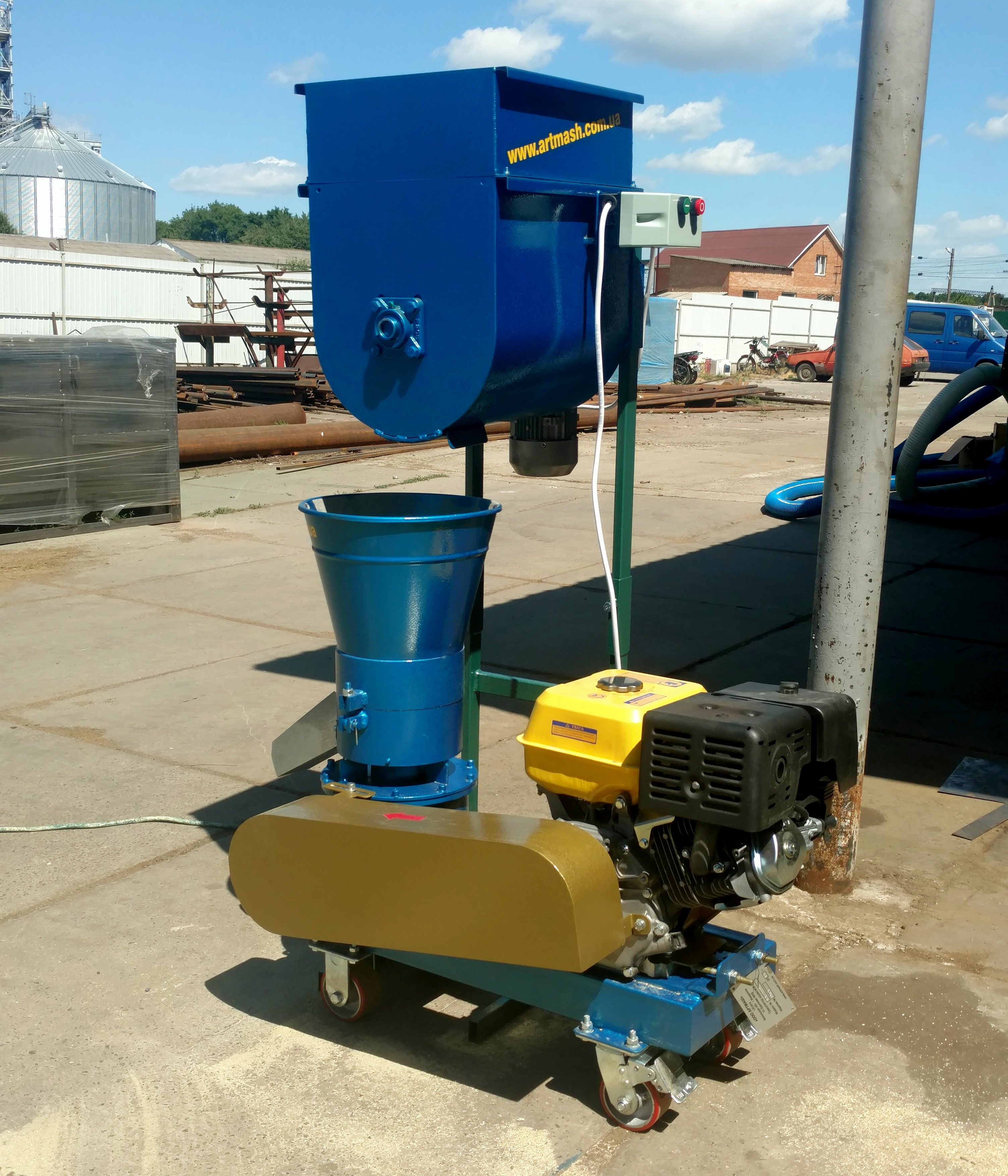 Гранулятор кормів разом зі шнеком-змішувачем